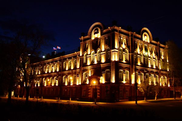 Здание администрации Костромской области (ночная съёмка)